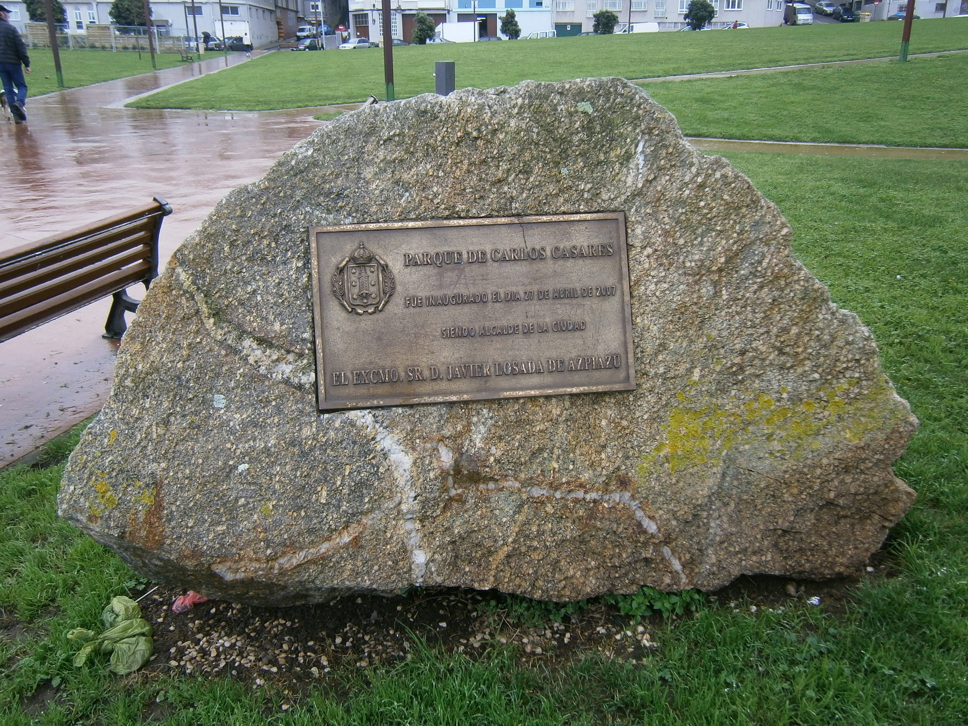 Placa da inauguración do parque de Carlos Casares (A Coruña)